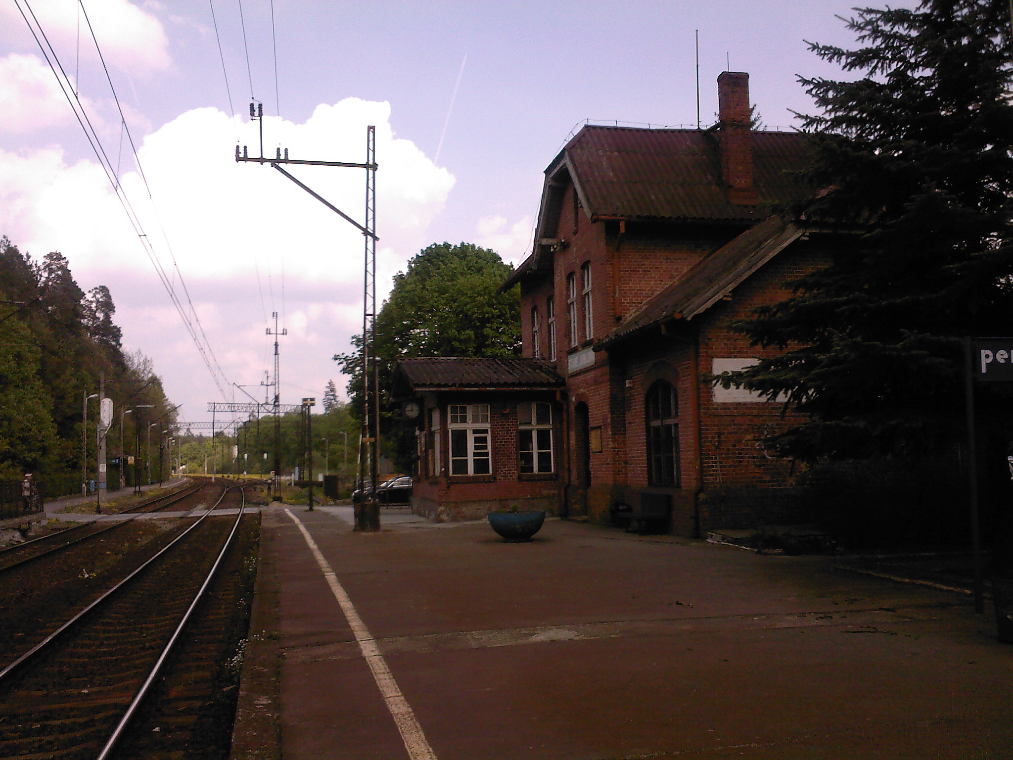 Dworzec kolejowy w Starych Jabłonkach, widok na przejazd kolejowy.